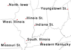 Modifs persos (zoom) de la carte de localisation des universités membres de la Gateway Football League (sports universitaires, USA)